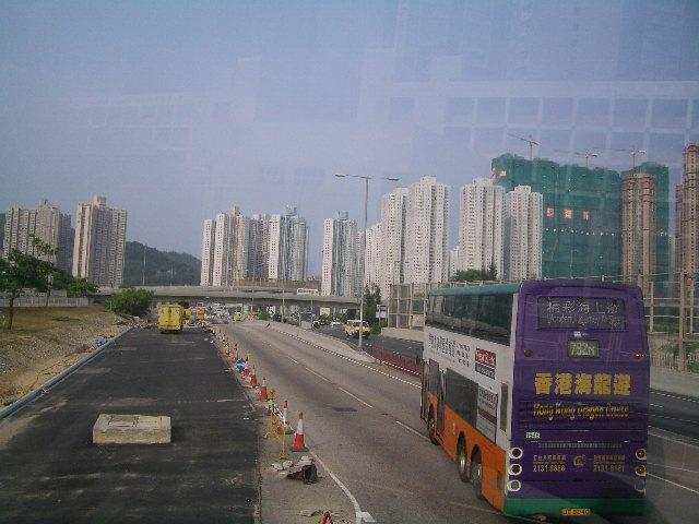 User:Kwan Zheung Laonnie: 將軍澳 Tseung Kwan O, Hong Kong